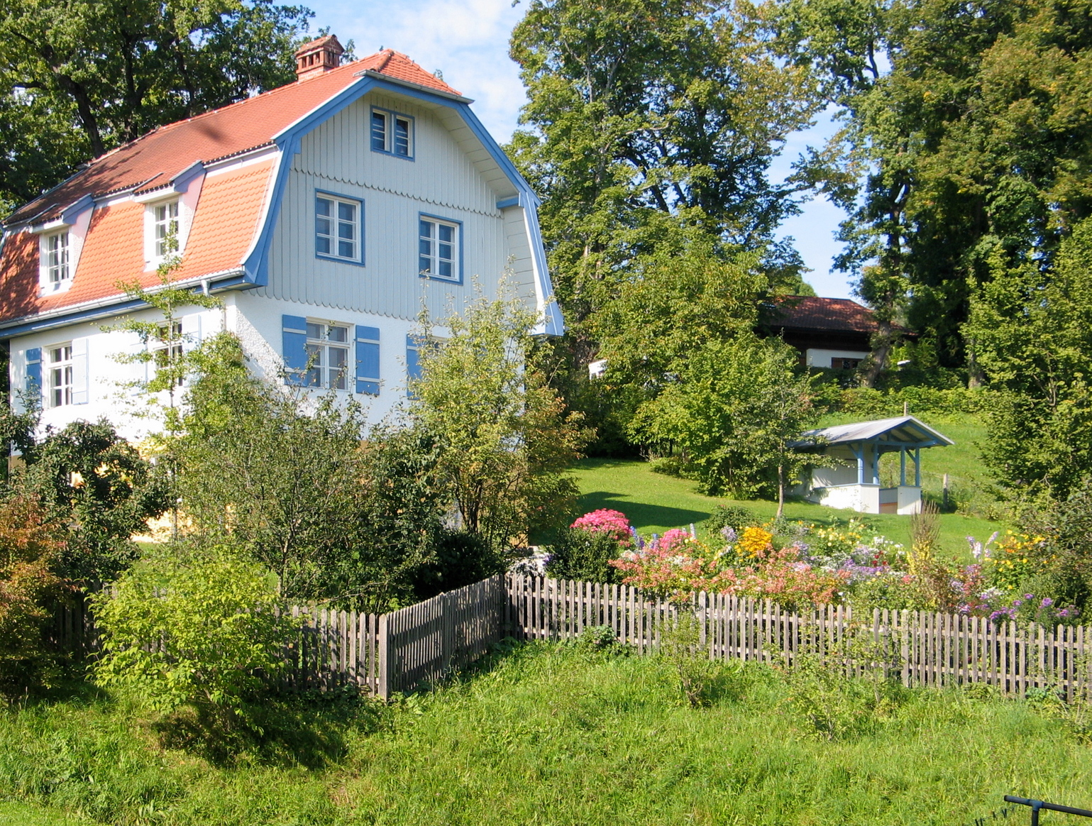 Haus von Gabriele Münter in Murnau am Staffelsee Creator: Heide Bauer